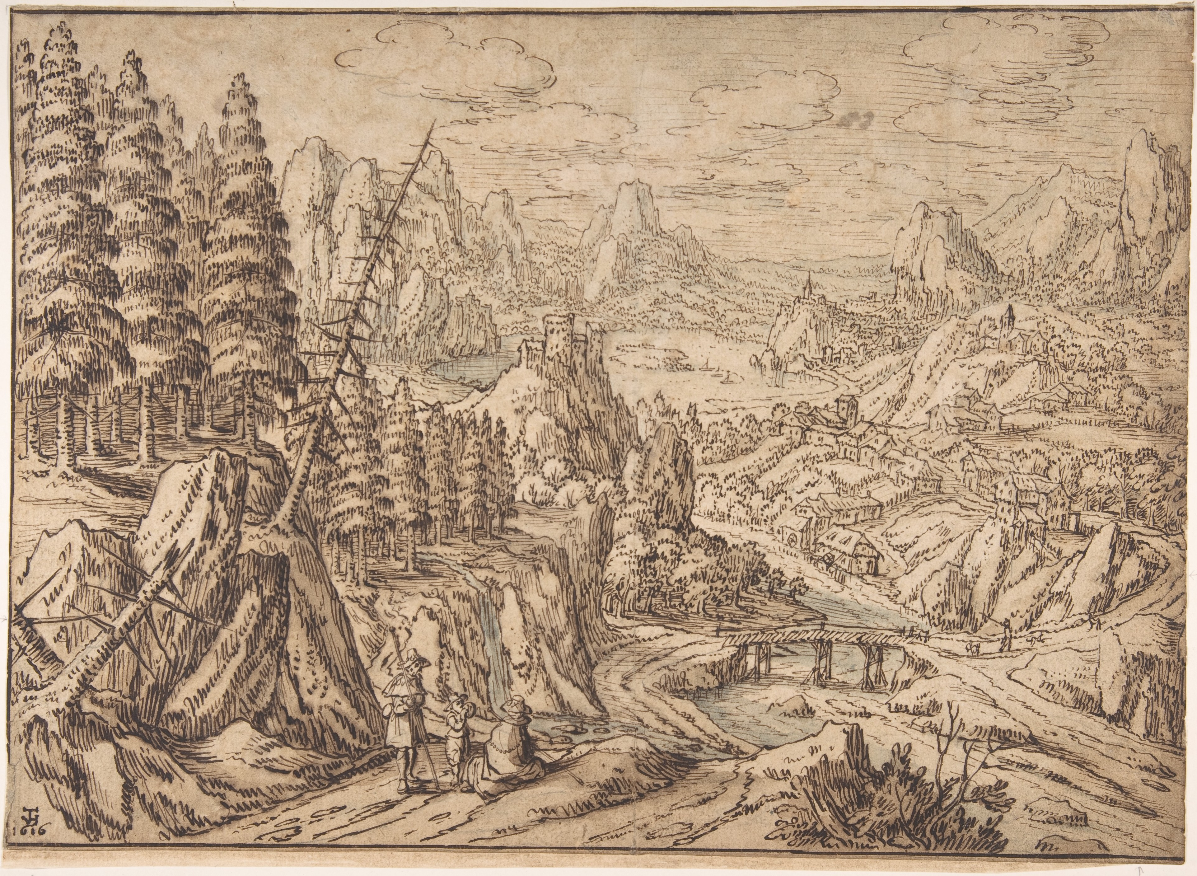 Drawing; Drawings